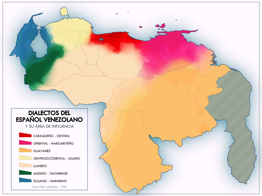 Extensión de los siete dialectos en que se divide el acento español venezolano; según Páez Urdaneta, Iraset. 1981. (Historia y geografía hispanoamericana del voseo. Caracas: La Casa de Bello. )